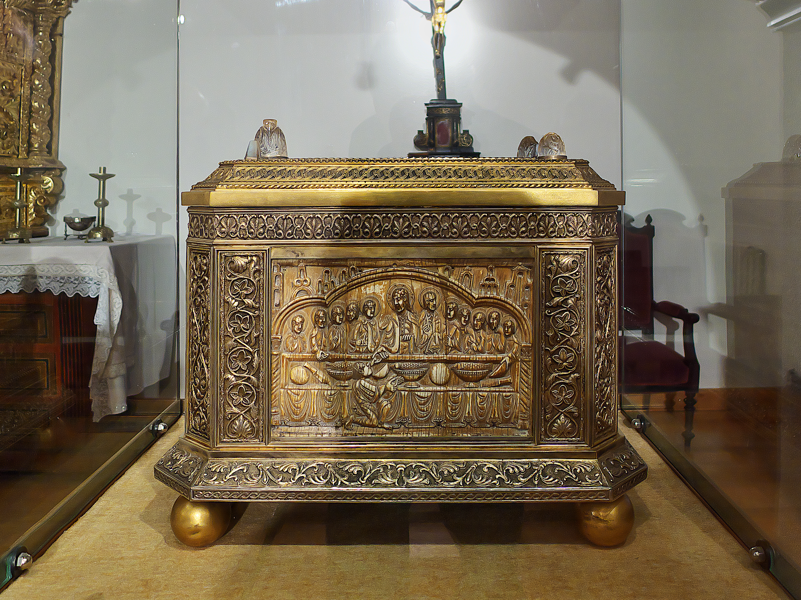 San Felices de Bilibio (ca. 443-540), anacoreta, fué el maestro de Emiliano, que sería santo. Sus restos se trasladan a Yuso (1090). Pedro Sánchez del Castillo, abad benedictino del Monasterio de Yuso construye una nueva arca, depositaria de sus reliquias (1489), siendo reconstruída en el año 1817. La francesada ocasionó su restauración en 1944 y el expolio de marfiles.